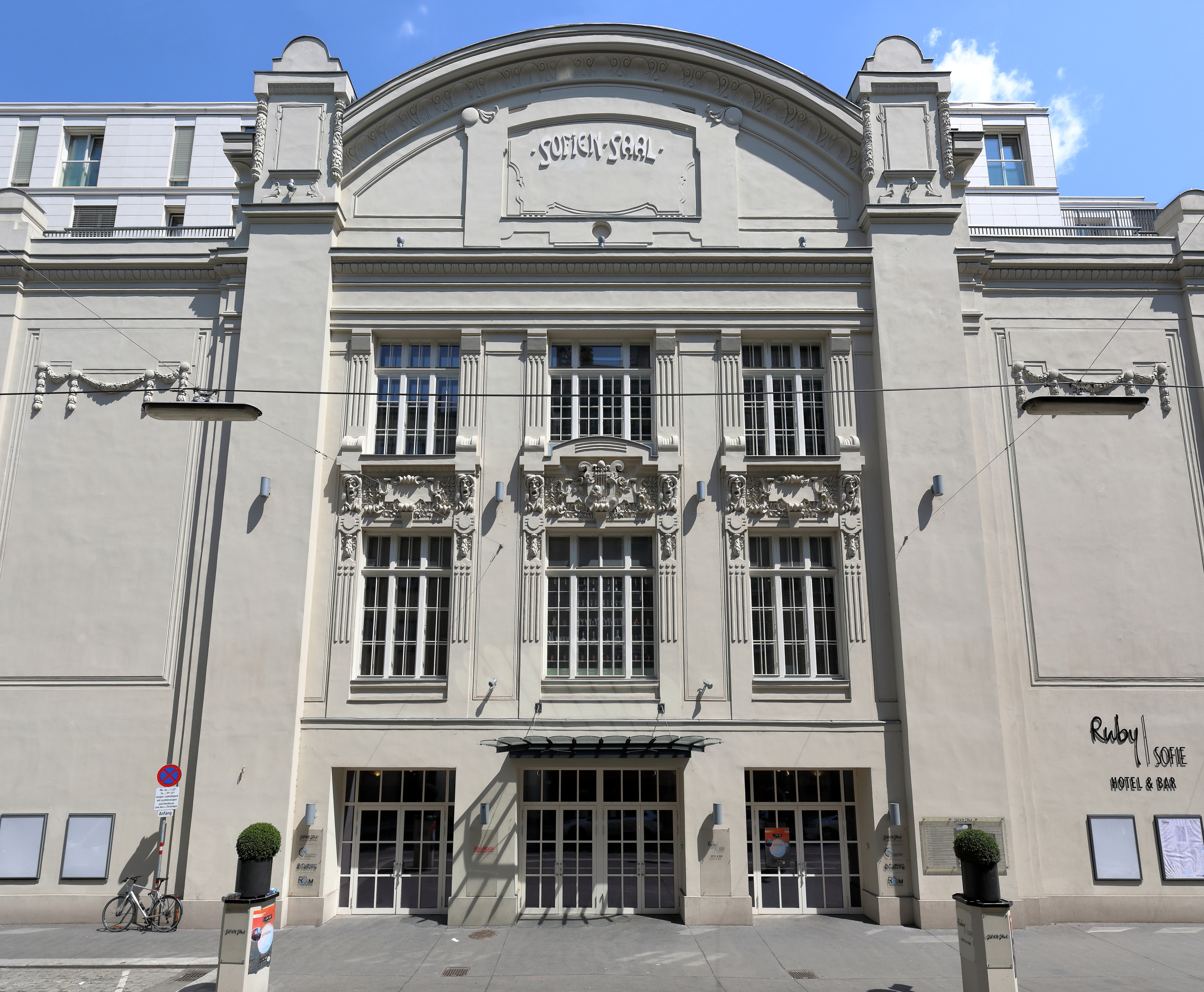 Die Hauptfassade der ehemaligen Sofiensäle im 3. Wiener Gemeindebezirk Landstraße.Das Gebäude wurden von 1845 bis 1849 nach Plänen von Eduard van der Nüll und August Sicard von Sicardsburg als „Sophienbad“ (benannt nach der Erzherzogin Sophie) errichtet, dessen Schwimmhalle im Winter als Ballsaal genutzt wurde. Es wurde mehrfach um- und ausgebaut. Von 1898 bis 1899 wurde die Hauptfassade von dem Architekten Ernst Gotthilf-Miskolczy im secessionistischen Stil neu gestaltet. 1909 erfolgte die Einstellung des Badebetriebs und das Gebäude wurde nur mehr für Bälle, Konzerte und Veranstaltungen genutzt. Am 16. August 2001 brannten die Sofiensäle zur Gänze ab. Um 2010 erfolgte ein Neubau mit rd. 65 Wohnungen, etwa 125 Tiefgaragenplätze, einem Festsaal mit rd. 700 m², einer Bar mit 160 m² und einem Salon mit 170 m², wobei die alte Hauptfassade in den Neubau integriert wurde.